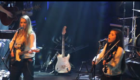 Sassybeat på Rockefeller 1. mars 2011